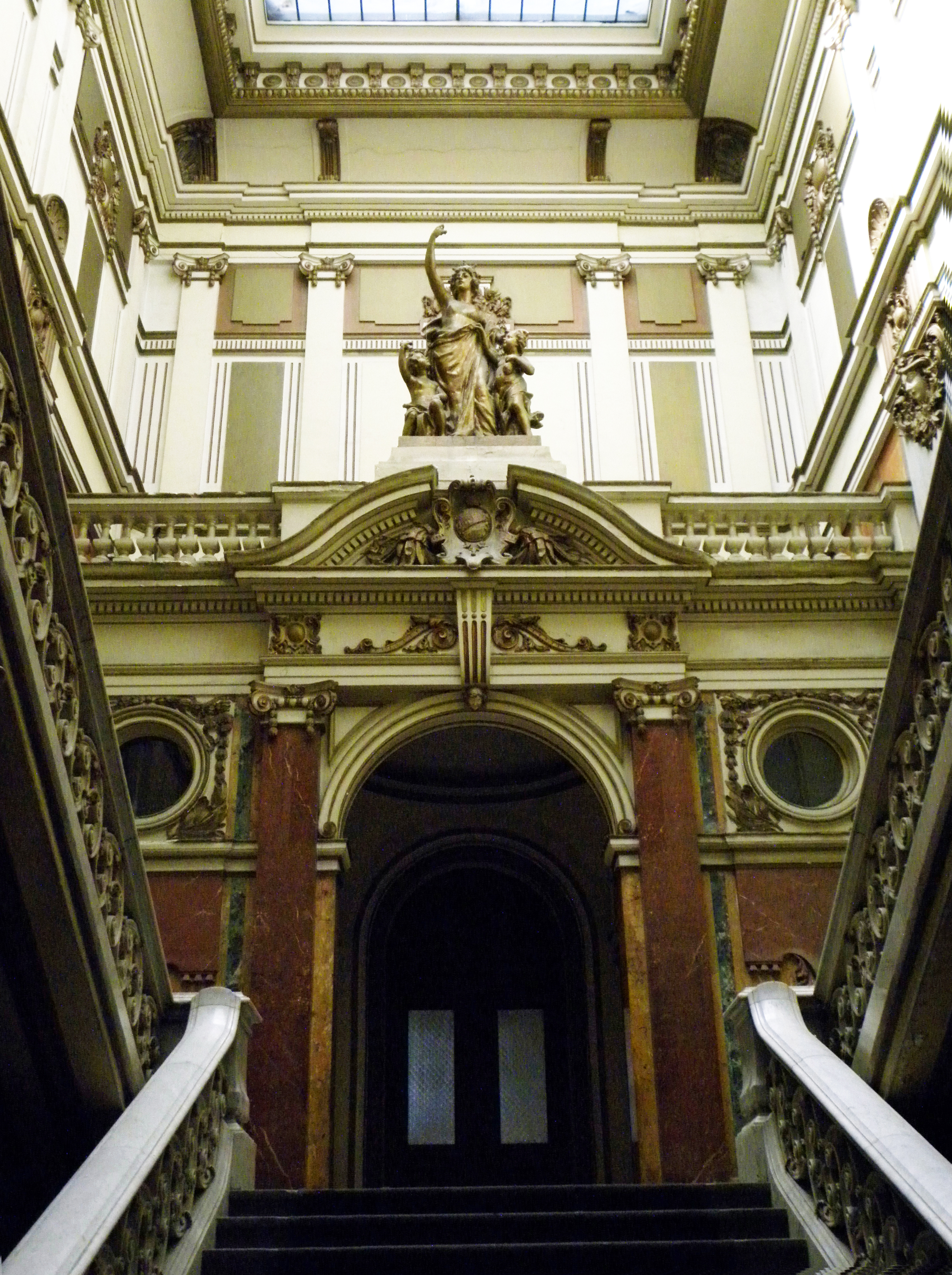 Detalj stepeništa Beogradske zadruge